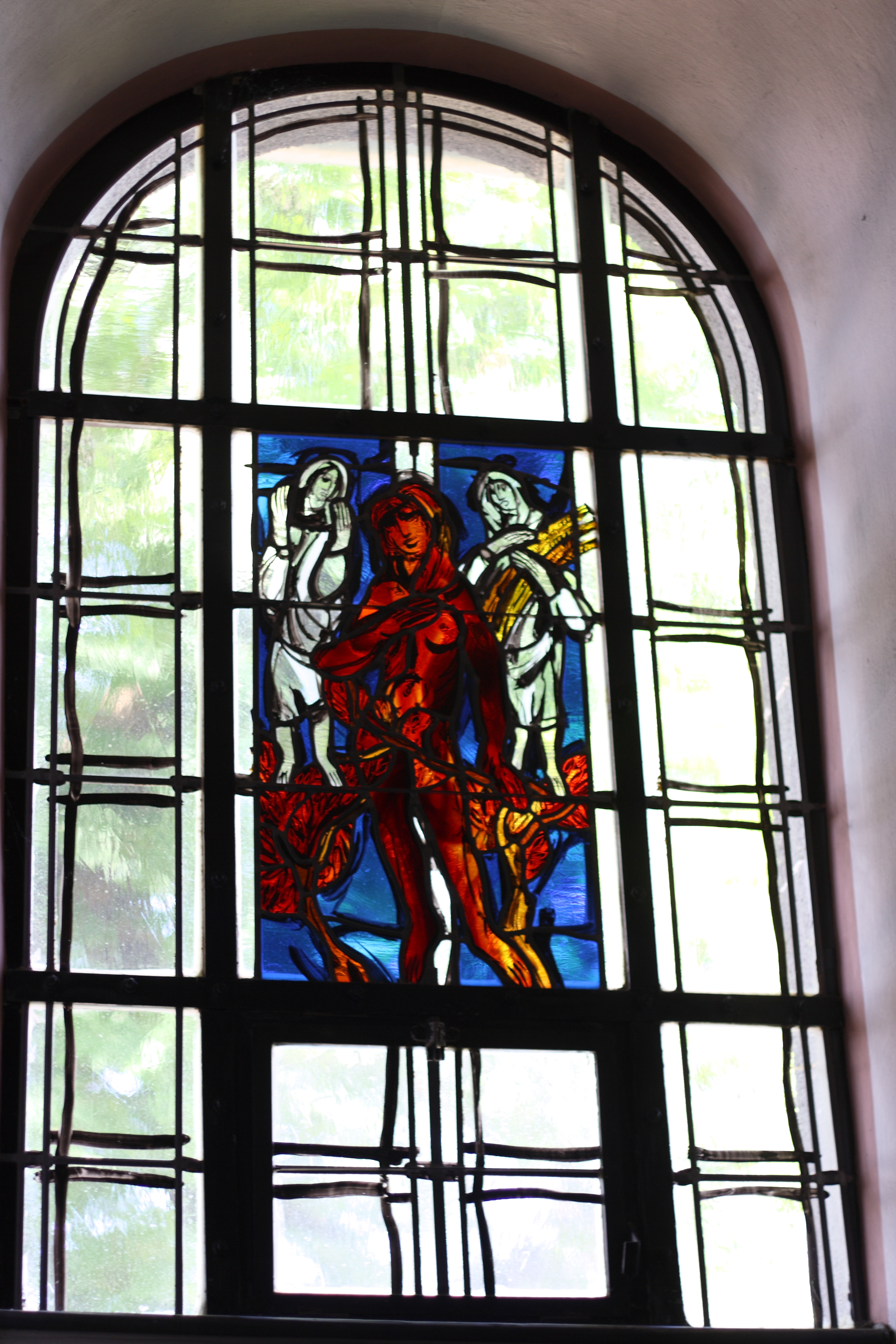 Bleiglasfenster in der Waldkapelle „Zur schmerzhaften Muttergottes“ in Kaisersesch